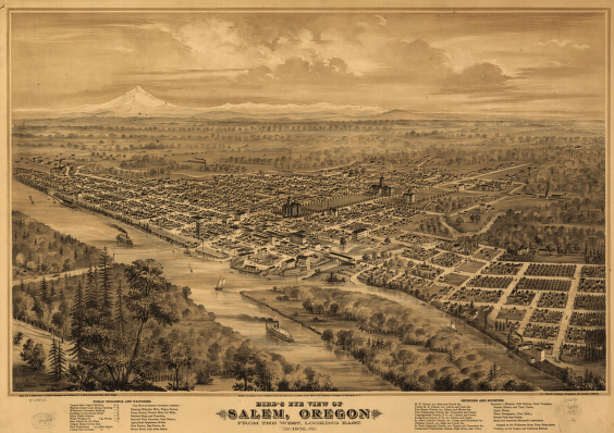 Salem, Oregon from [1]